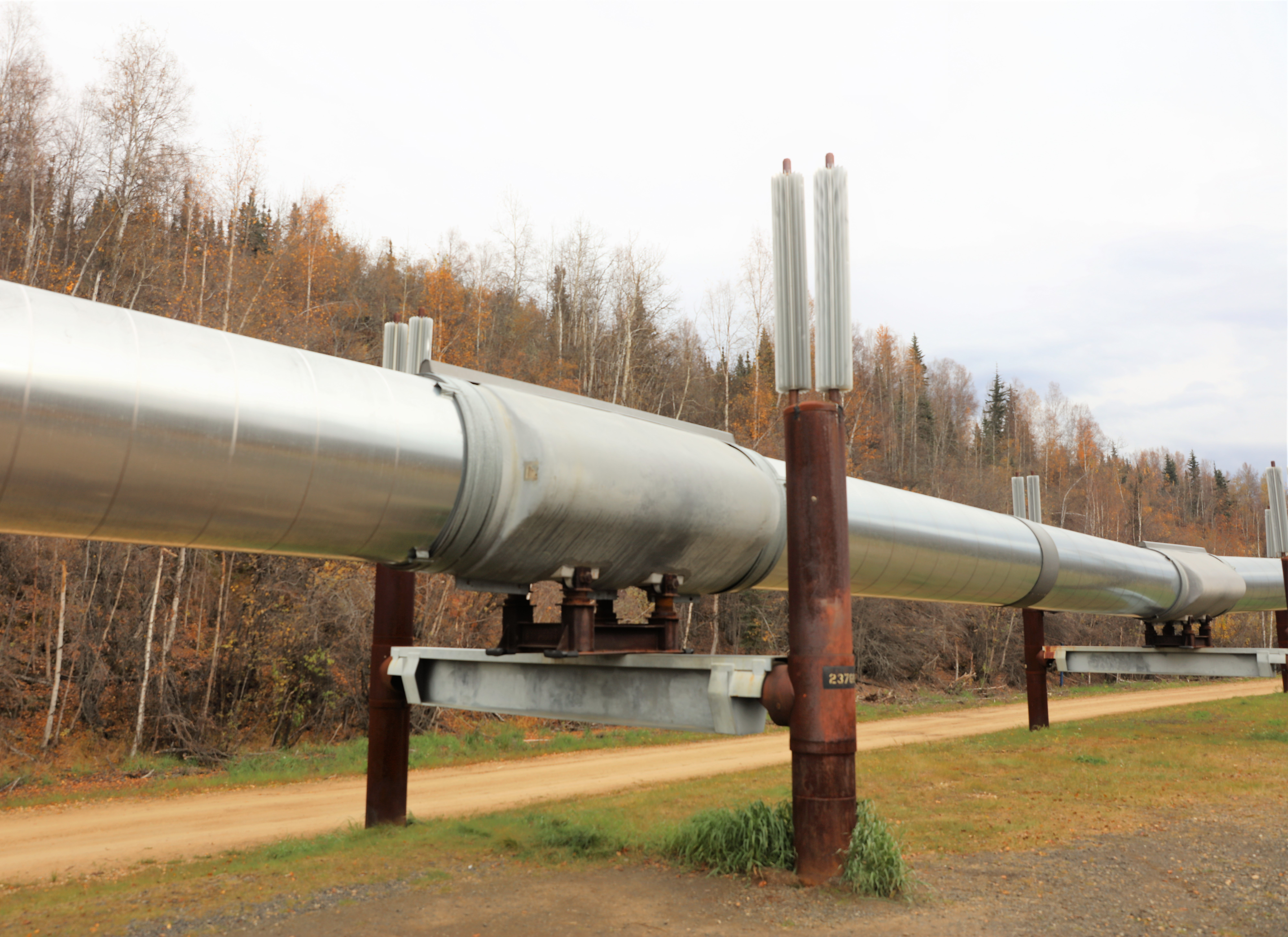 L'oleodotto in settembre nei pressi di Fairbanks